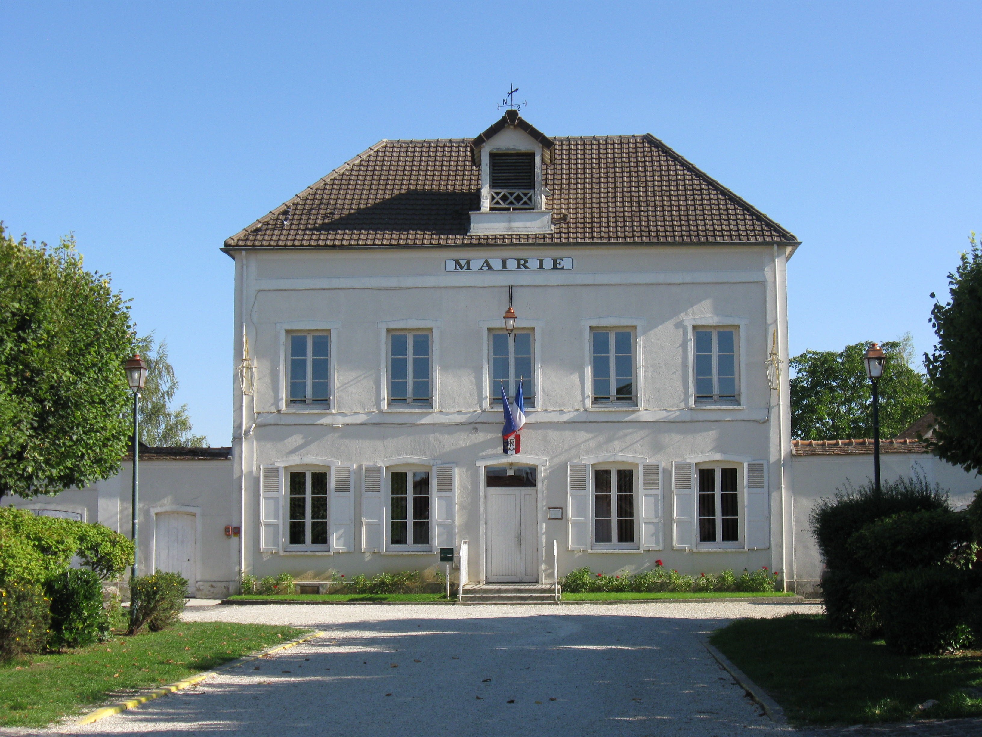 Mairie de Châtenay-sur-Seine. (Seine-et-Marne, région Île-de-France).